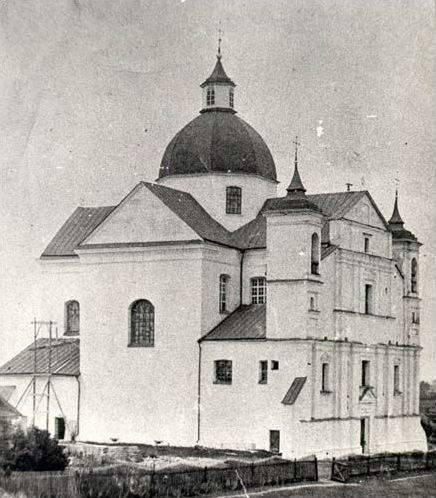 Беларуская (тарашкевіца): Глуск (Hłusk). Кляштар бэрнардынаў на тэрыторыі бастыённага замка